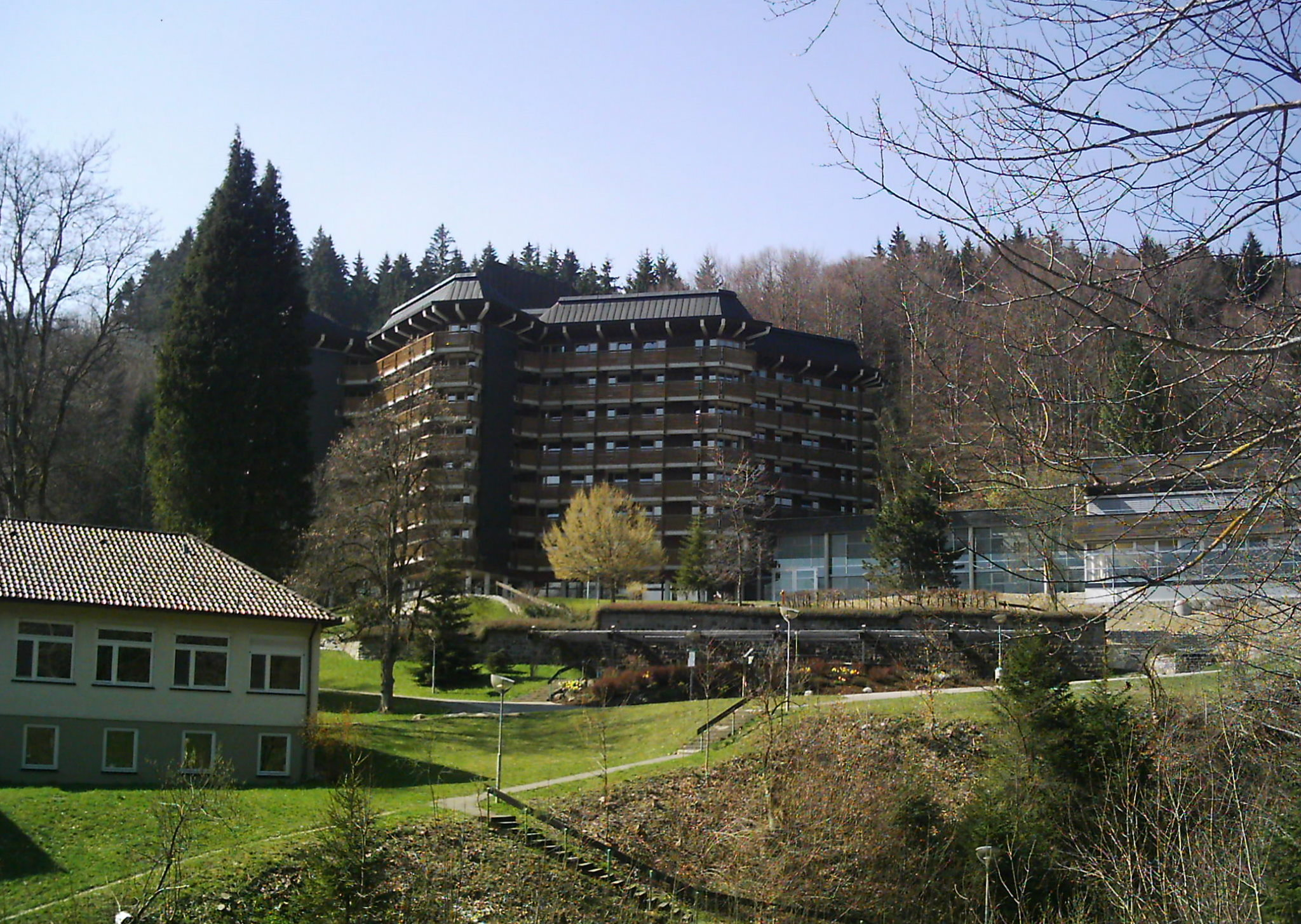 Rehaklinik Überruh - Fachklinik für Erkrankungen der Bewegungsorgane und Innere Medizin, für Kardiologie, Krebsnachsorge und Pneumologie in Bolsternang.